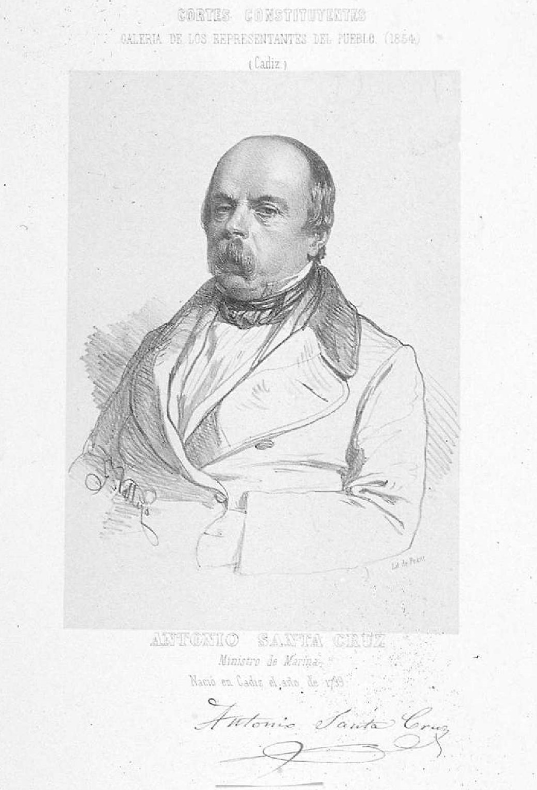 Retrato de Antonio Santa Cruz, litografía de José Vallejo Galeazo para la serie de retratos de diputados: Cortes constituyentes: galería de los representantes del pueblo (1854) / (Cádiz). Inscripción al pie: Antonio Santa Cruz / Ministro de Marina / Nació en Cádiz el año de 1799. Biblioteca Nacional de España